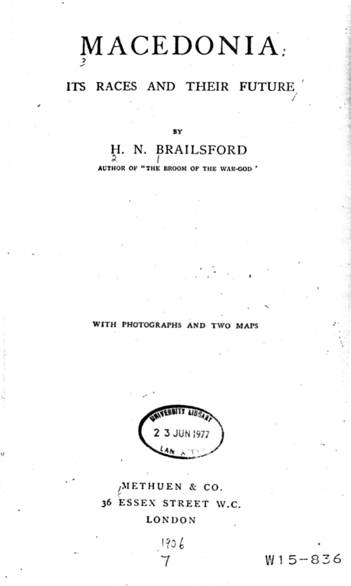 Macedonia; Its Races and Their Future